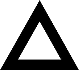 Prisma mobile app logo.